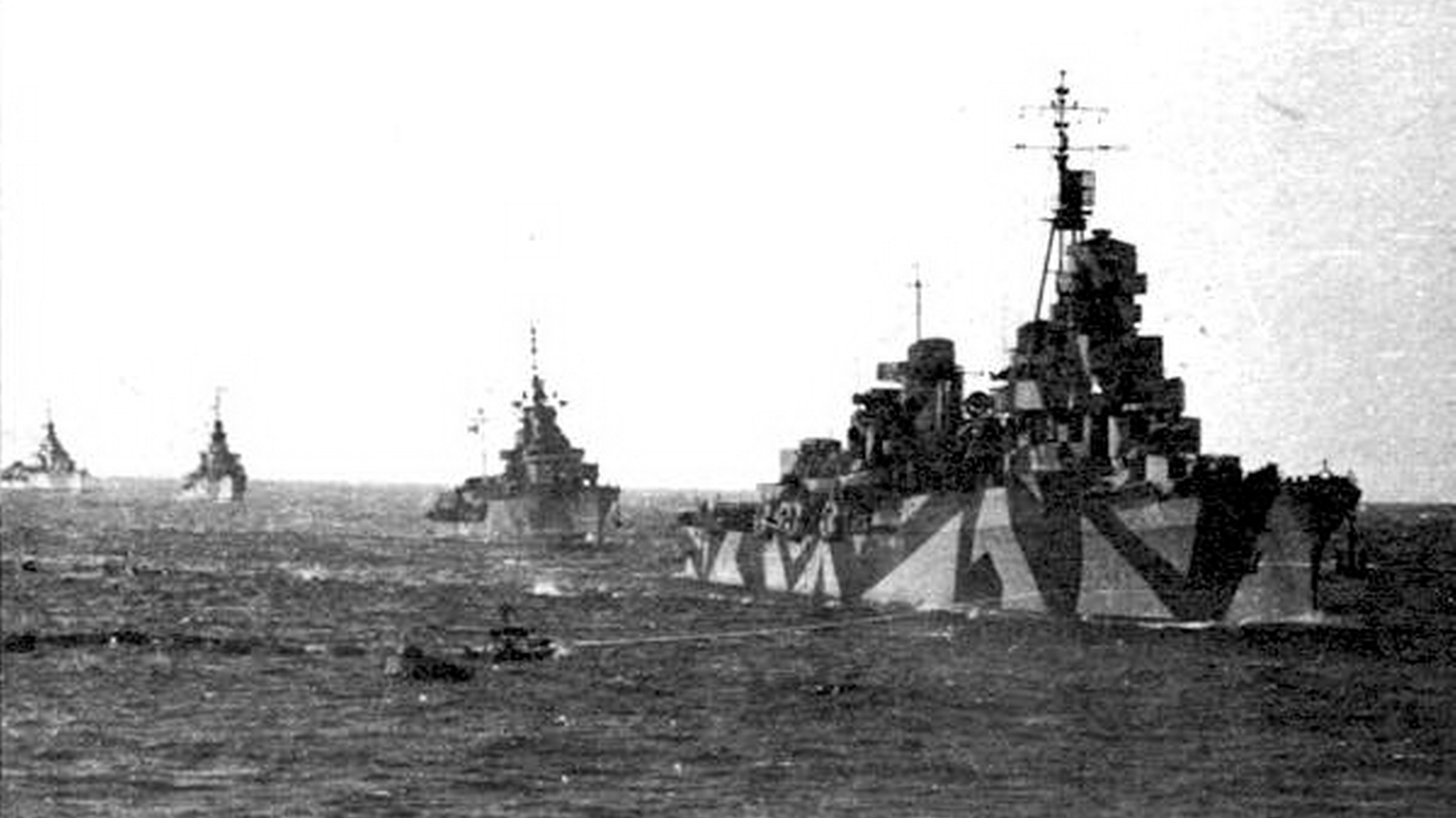 L'incrociatore Attilio Regolo in linea di fila con i cacciatorpediniere Mitragliere, Fuciliere e Carabiniere rientra a Taranto il 23 gennaio 1945 dopo l'internamento alle Baleari